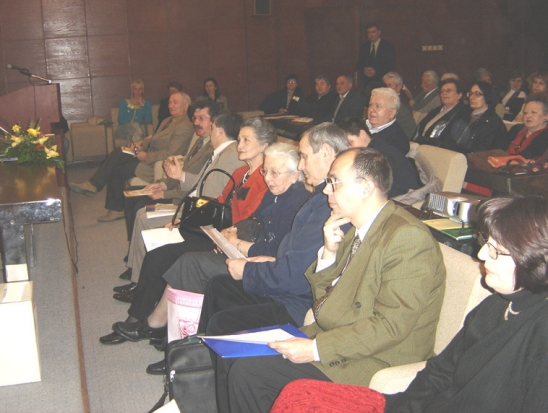 Tribina "Braća Kašanin", Beli Manastir, Mirovna grupa Oaza Beli Manastir, 25. III. 2006.